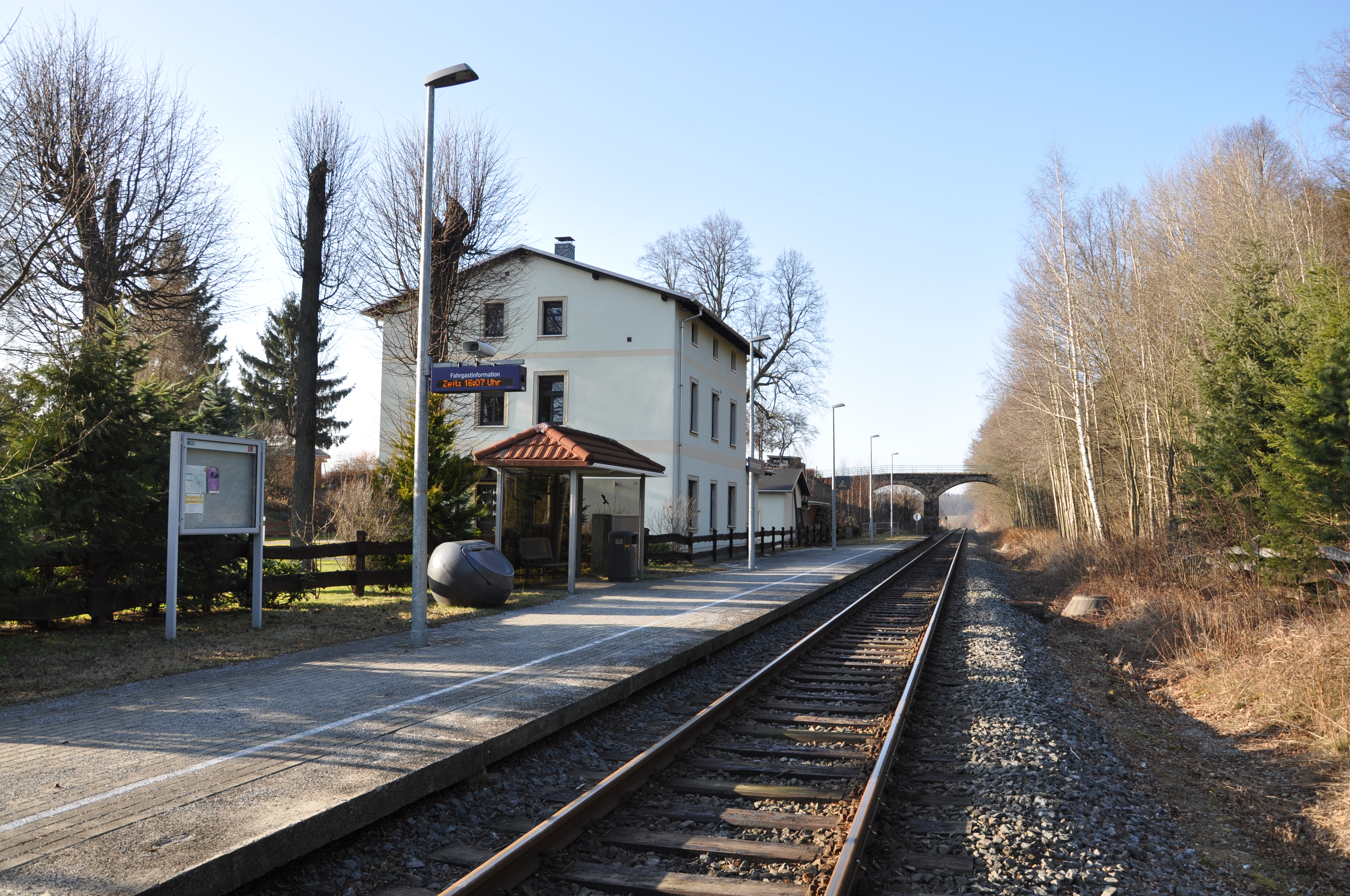 Haltepunkt Krumhermsdorf, Bahnstrecke Bautzen–Bad Schandau